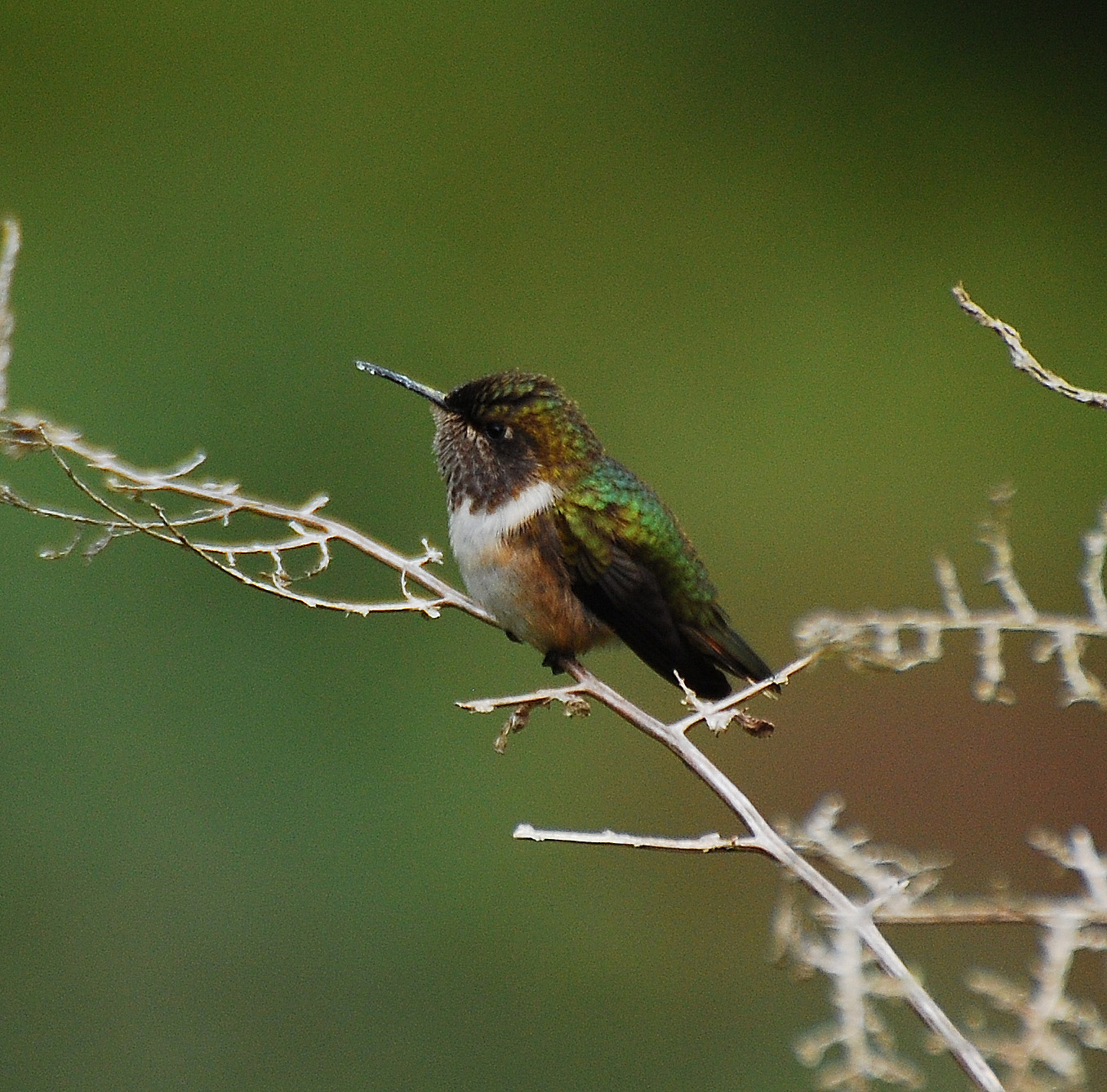 Volcano Hummingbird at the Mirador de Quetzals, Costa Rica, 080226. Selasphorus flammula.